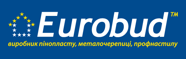 Євробуд